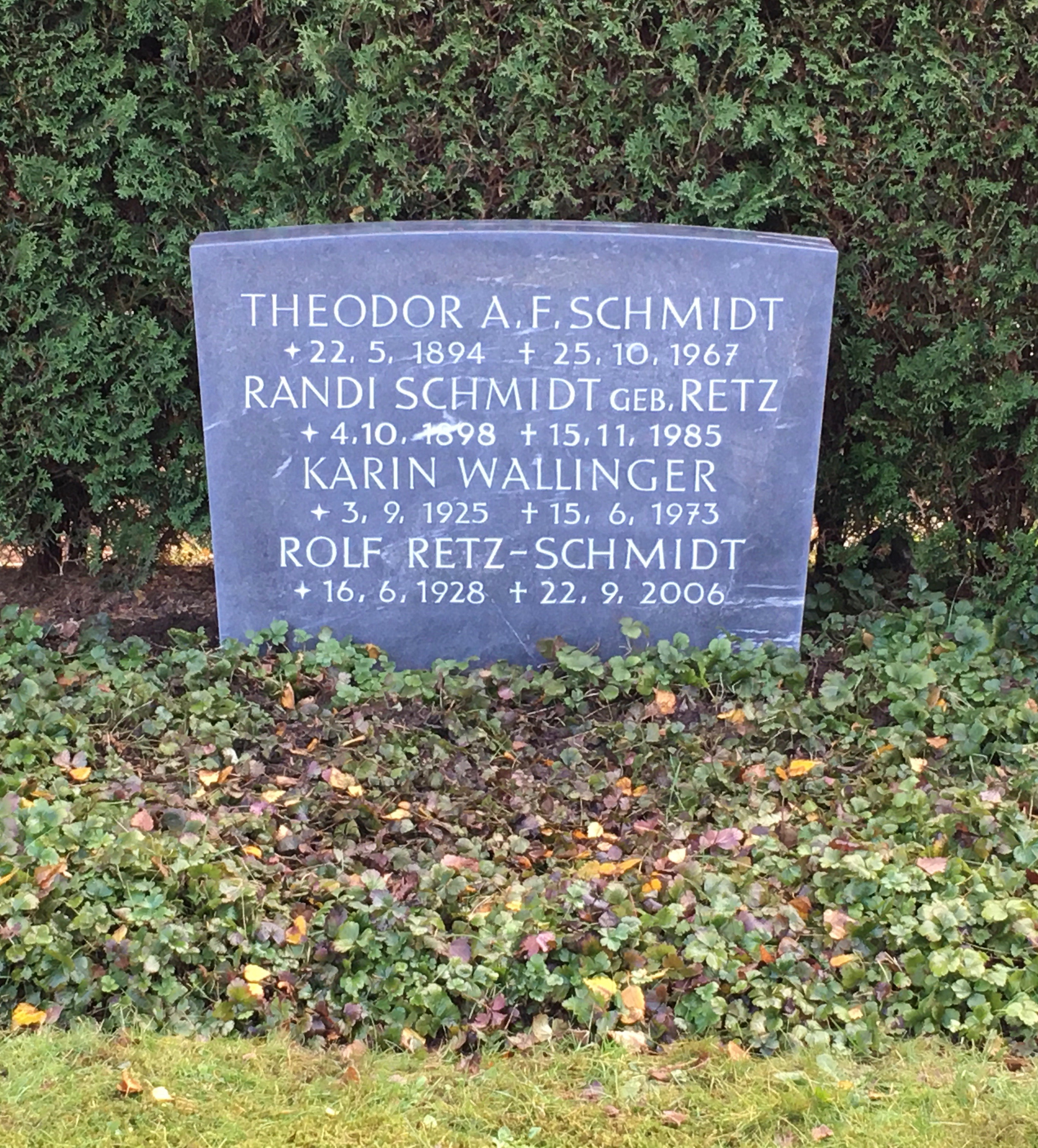 Familiengrab auf dem Rahlstedter Friedhof